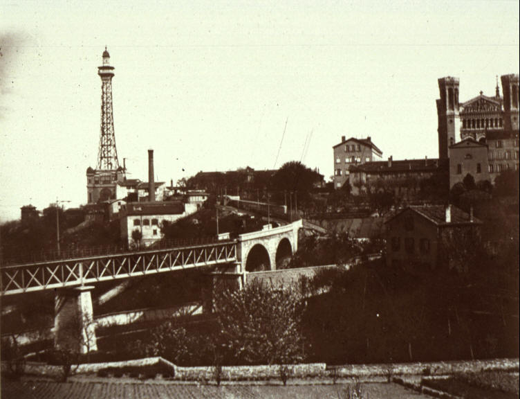 Le Funiculaire Saint-Paul - Fourvière et le tramway funéraire Fourvière - Loyasse